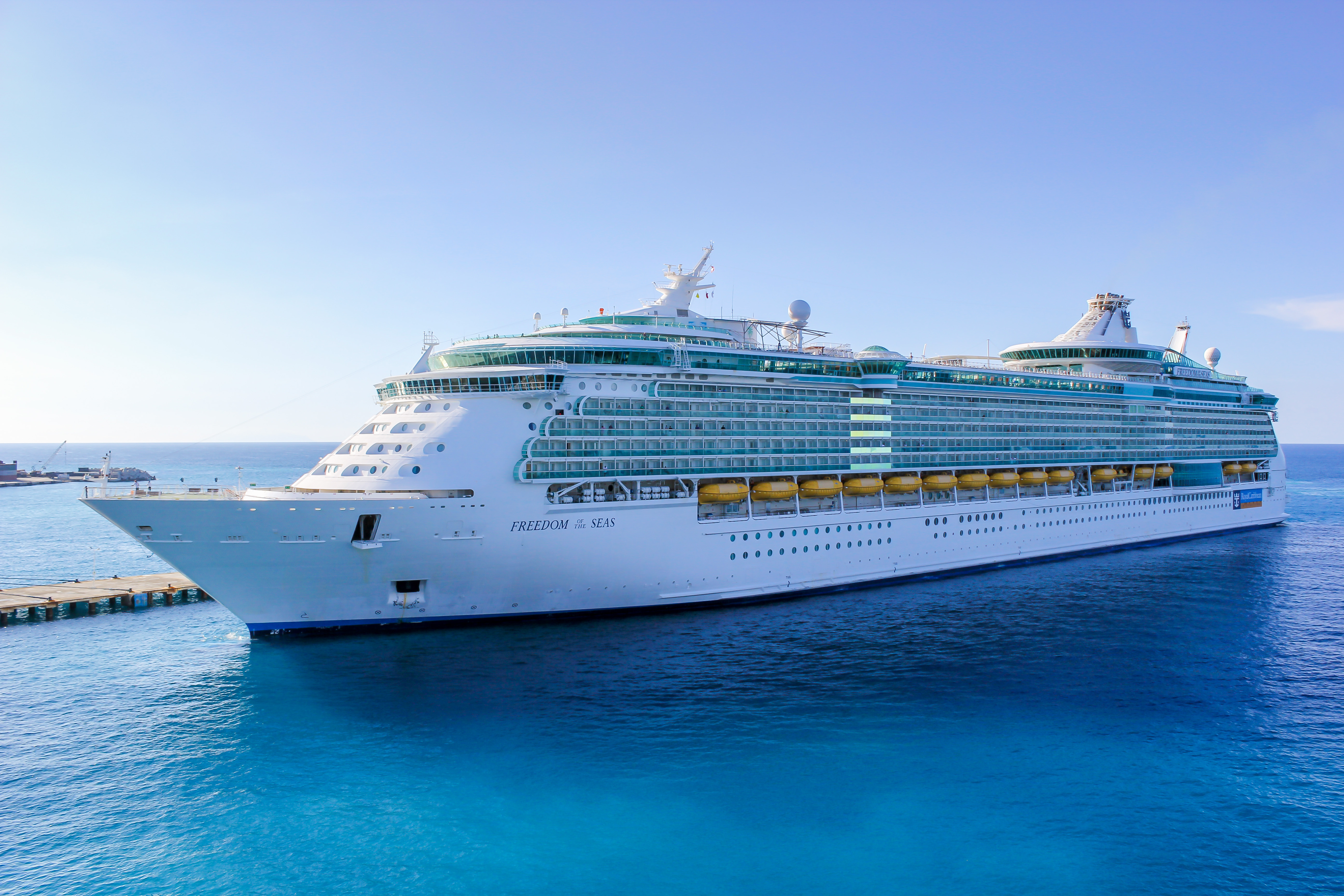 St Maarten